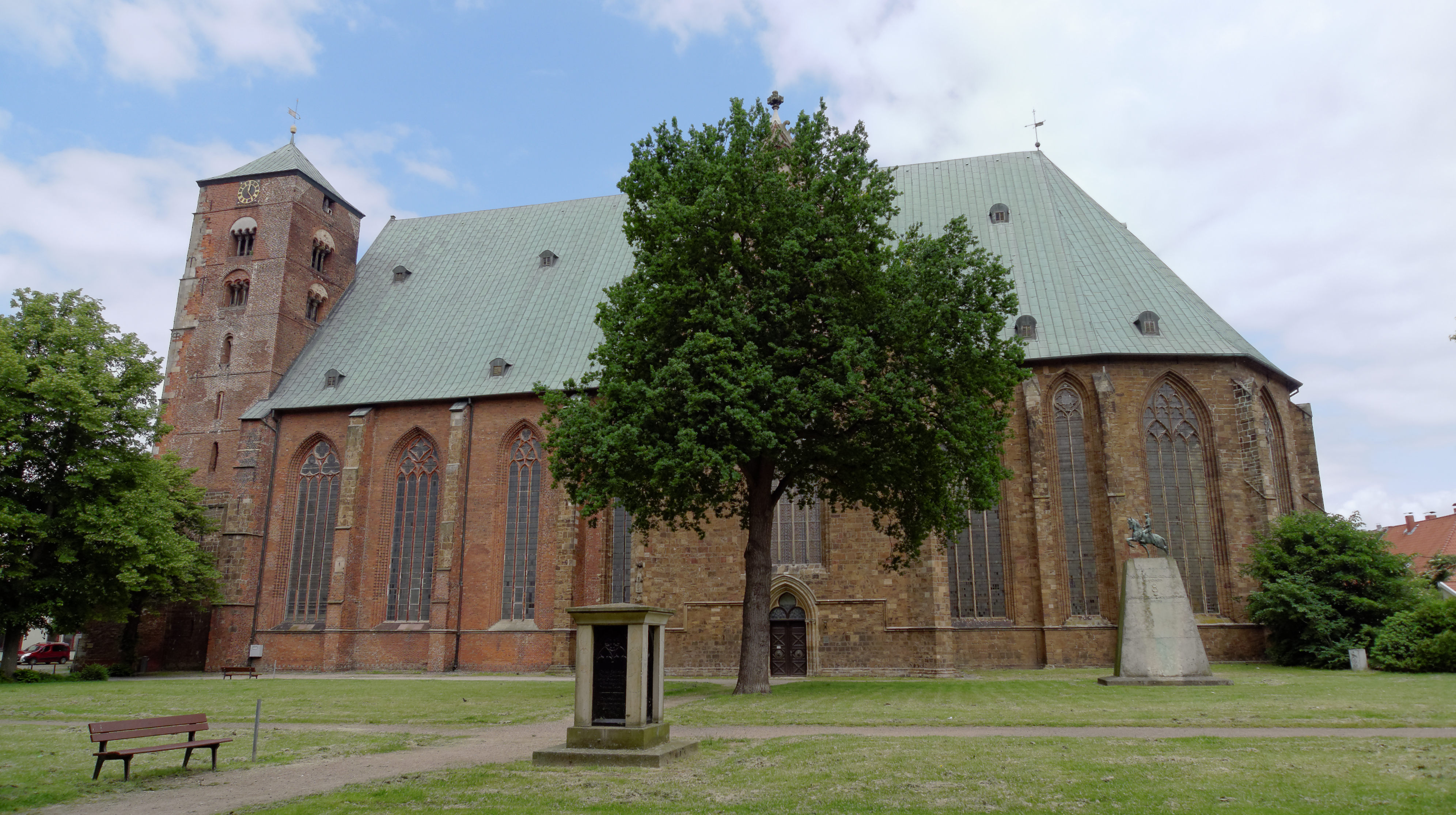 Südansicht des Doms zu Verden